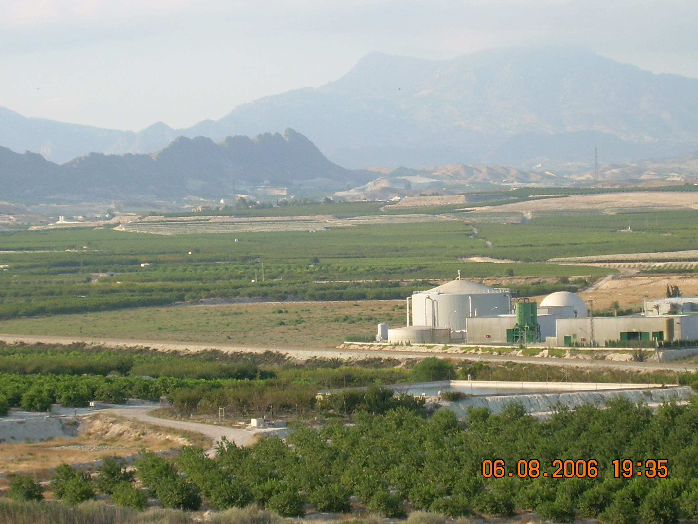 Vista de la vega de Campotéjar